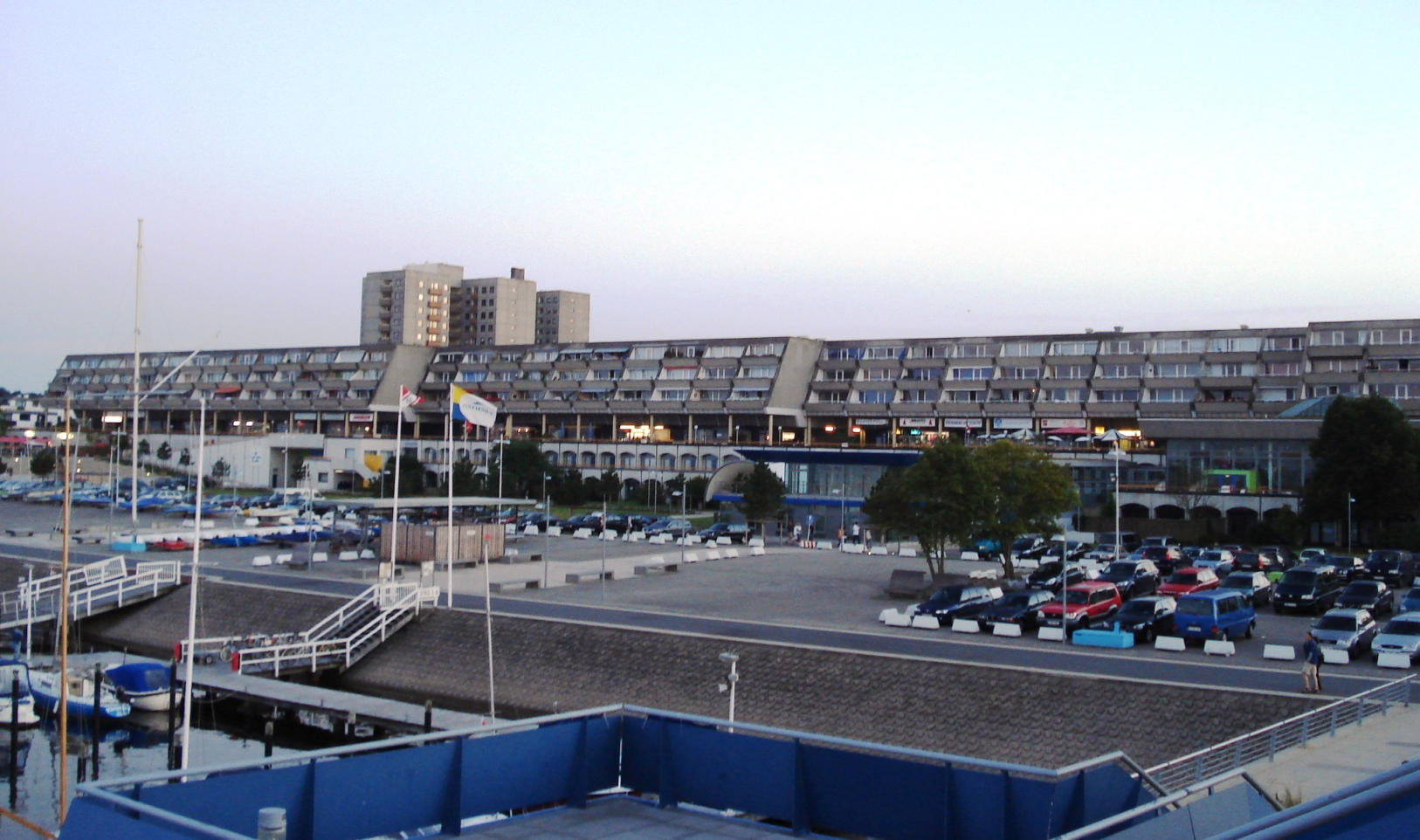 Das Olympiazentrum Kiel-Schilksee